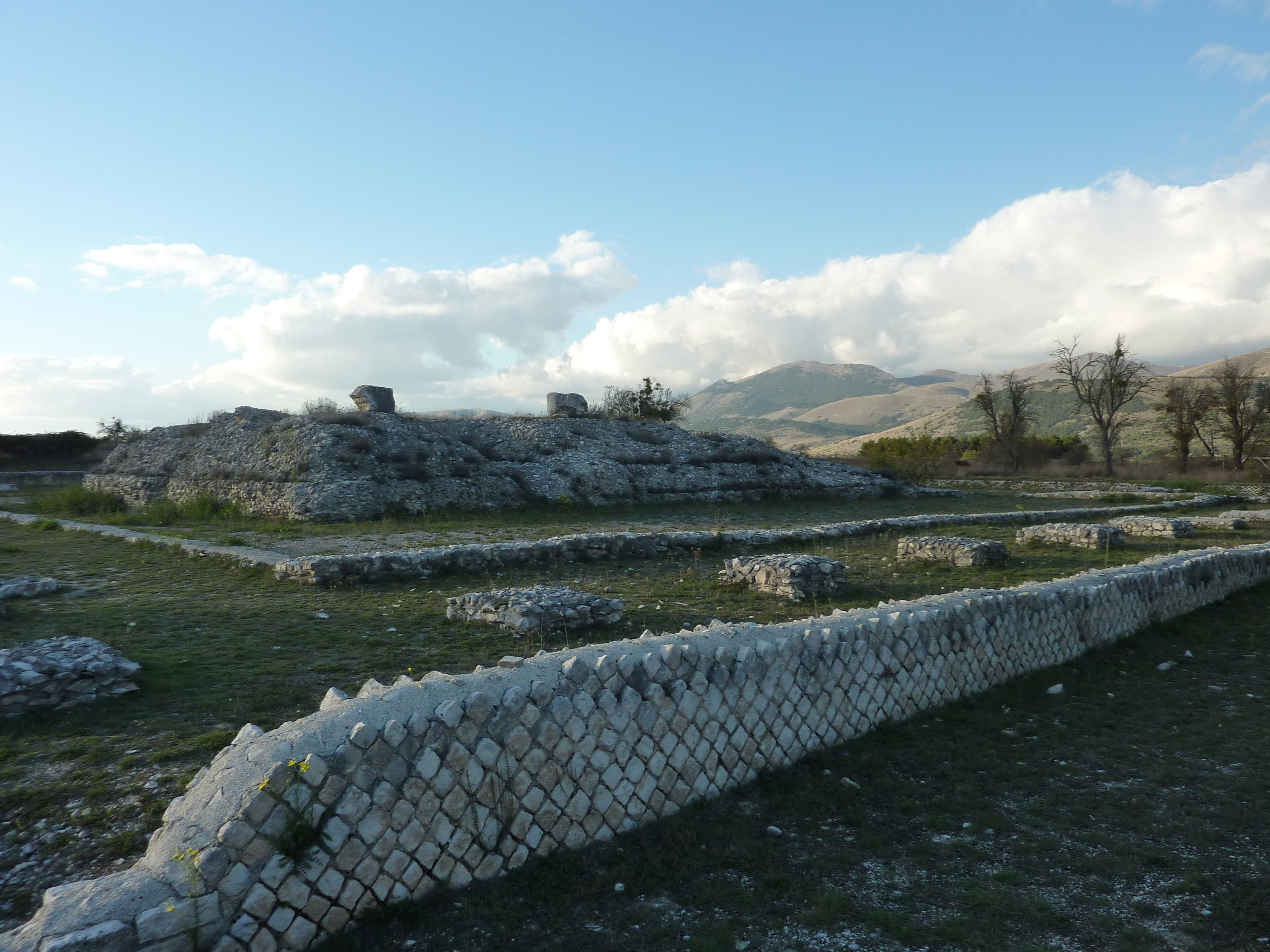 Peltuinum